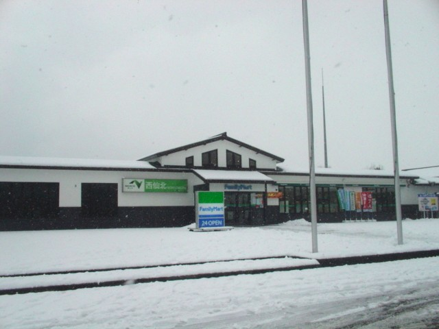 （秋田自動車道下り線の西仙北SA）